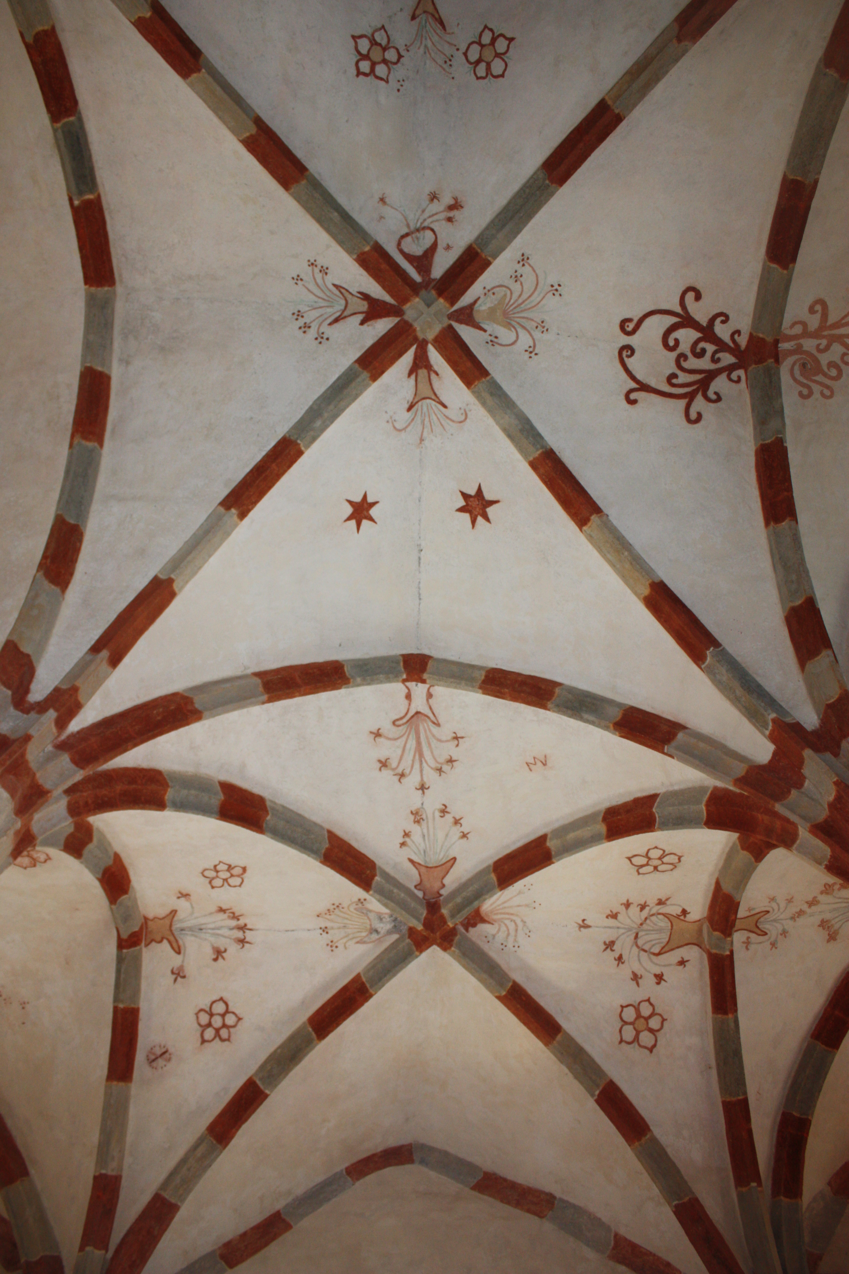 klenba